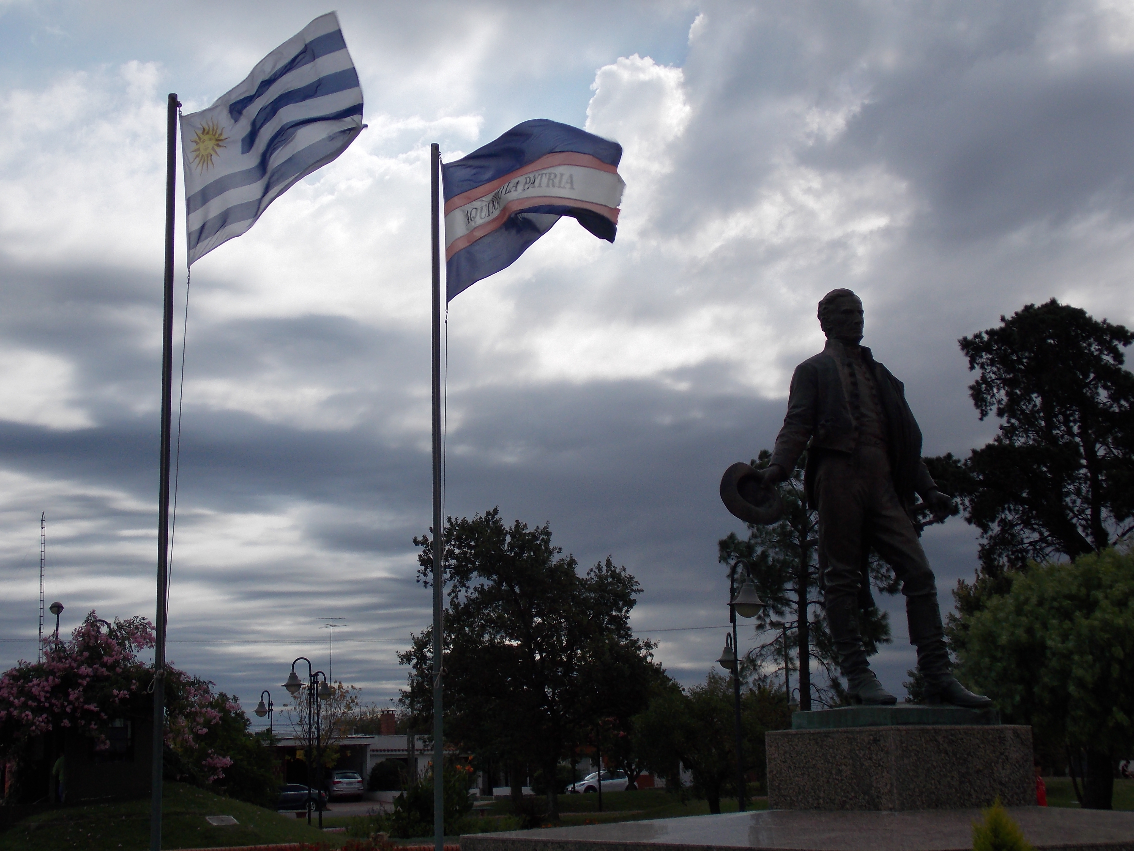 Monumento a Artigas (Cardona). Ubicada en el departamento de Soriano